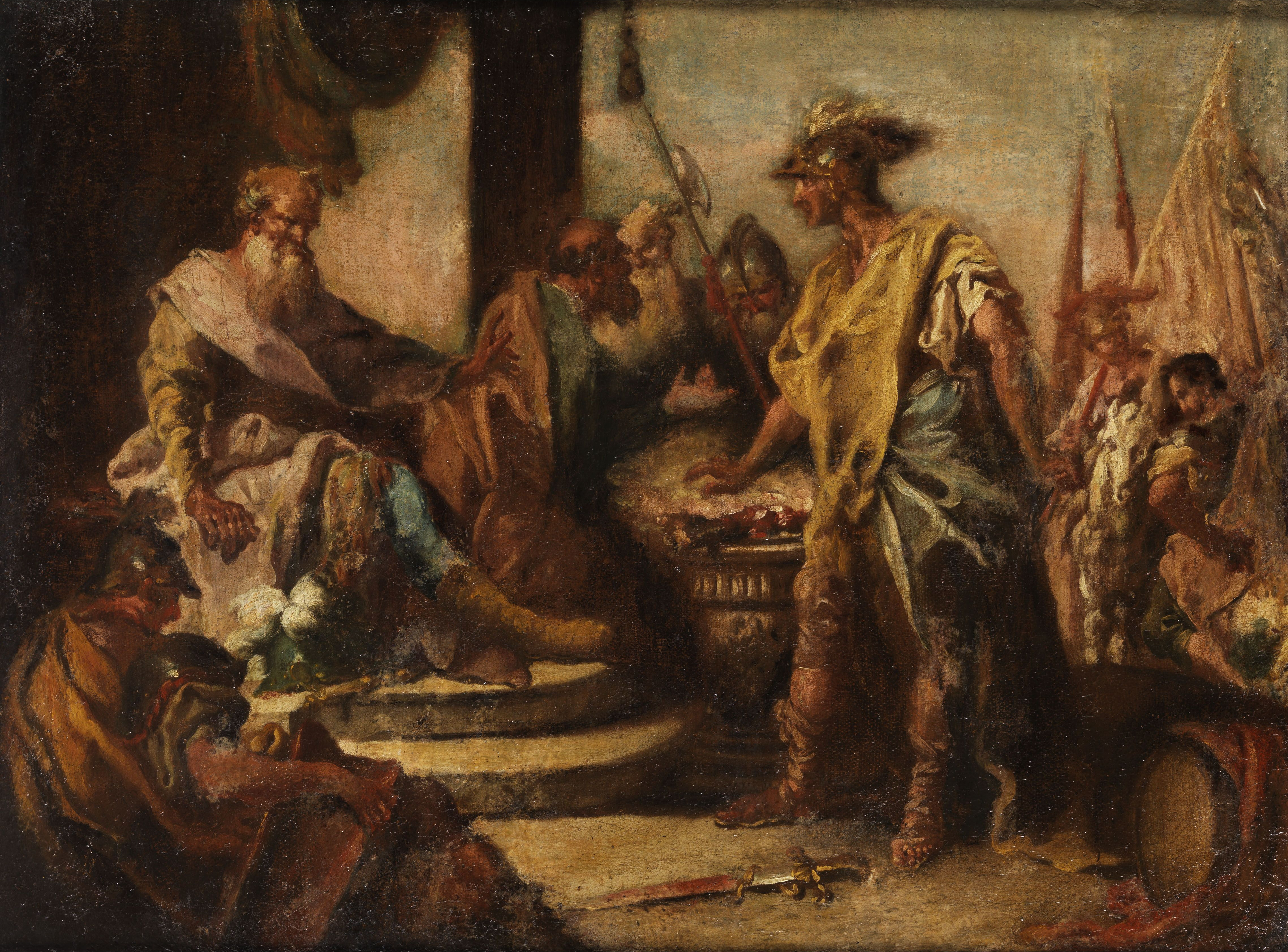 Norditalienischer/Venezianischer Maler des 18. Jahrhunderts